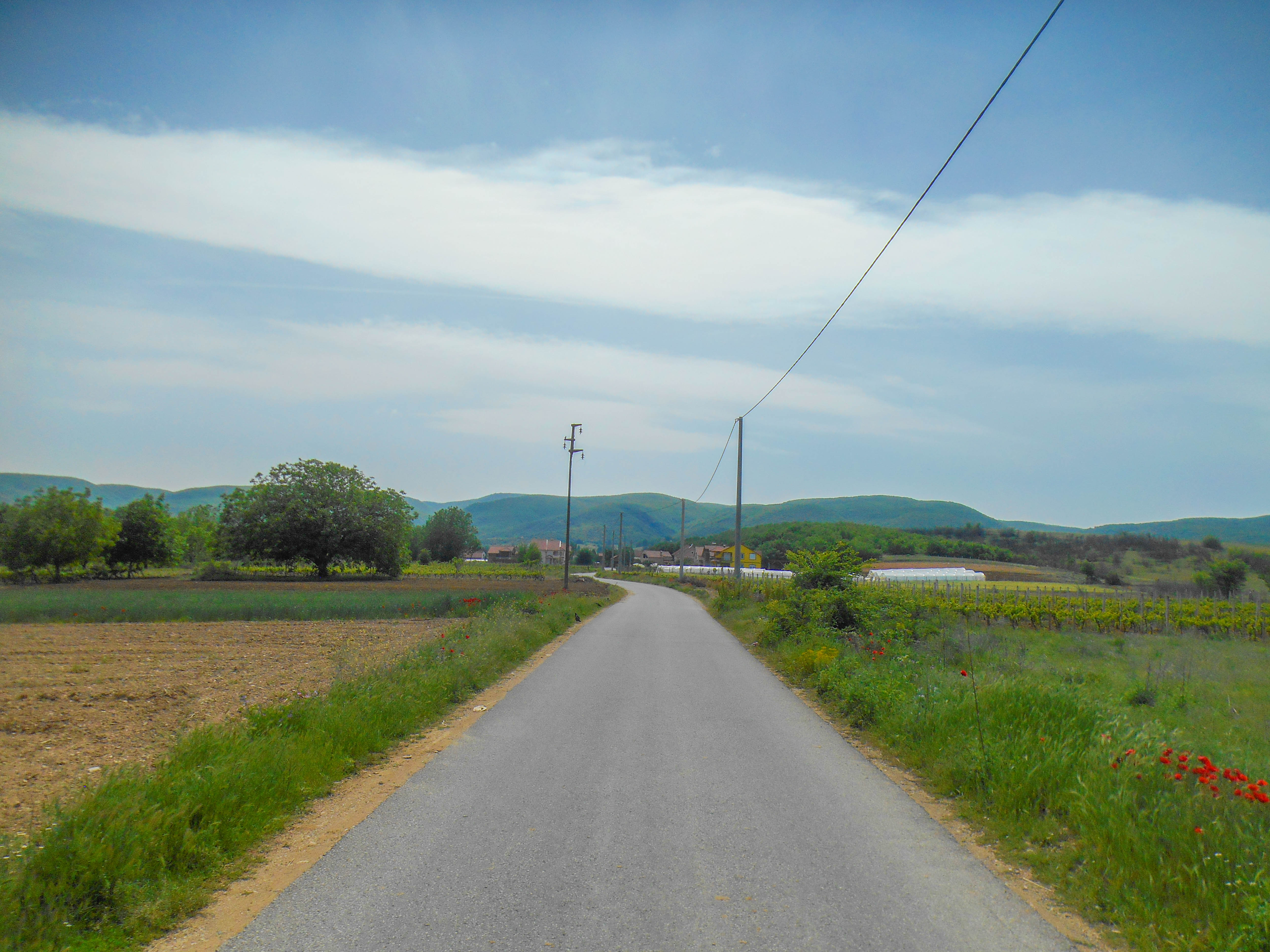 Дукатино